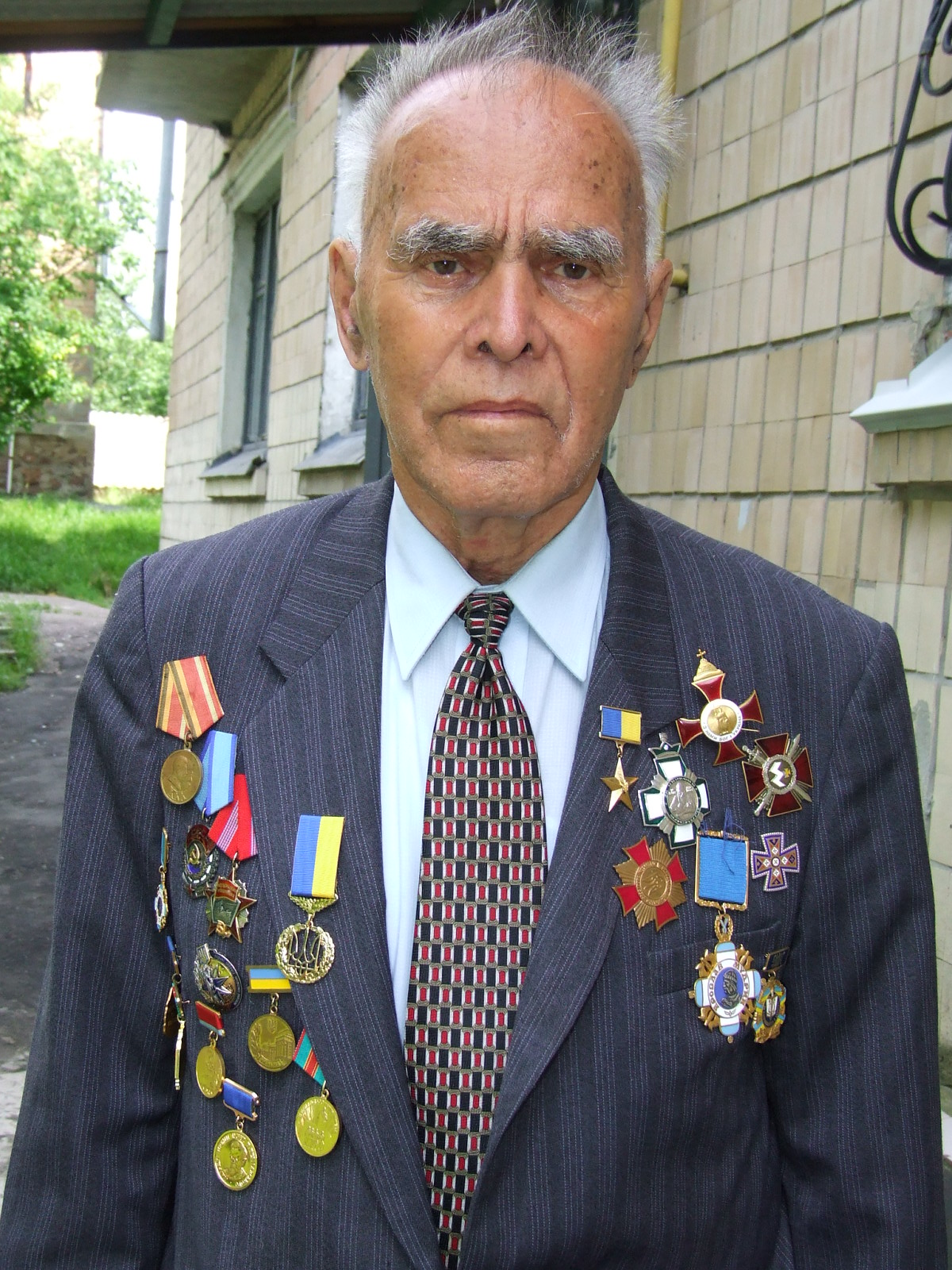 Сікорський Михайло Іванович. Почесний директор Національного історико-етнографічного заповідника «Переяслав»